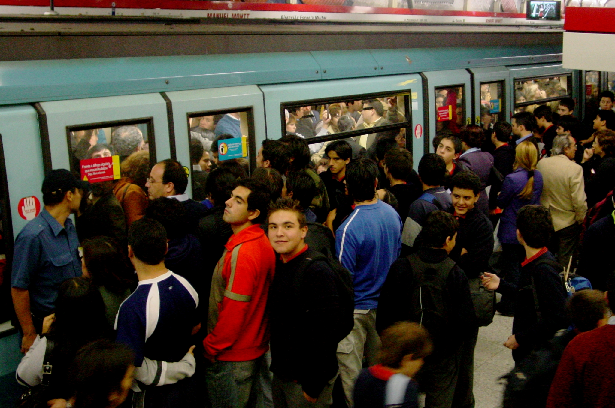 Le métro au heures de pointes, Santiago de Chile, Chili.